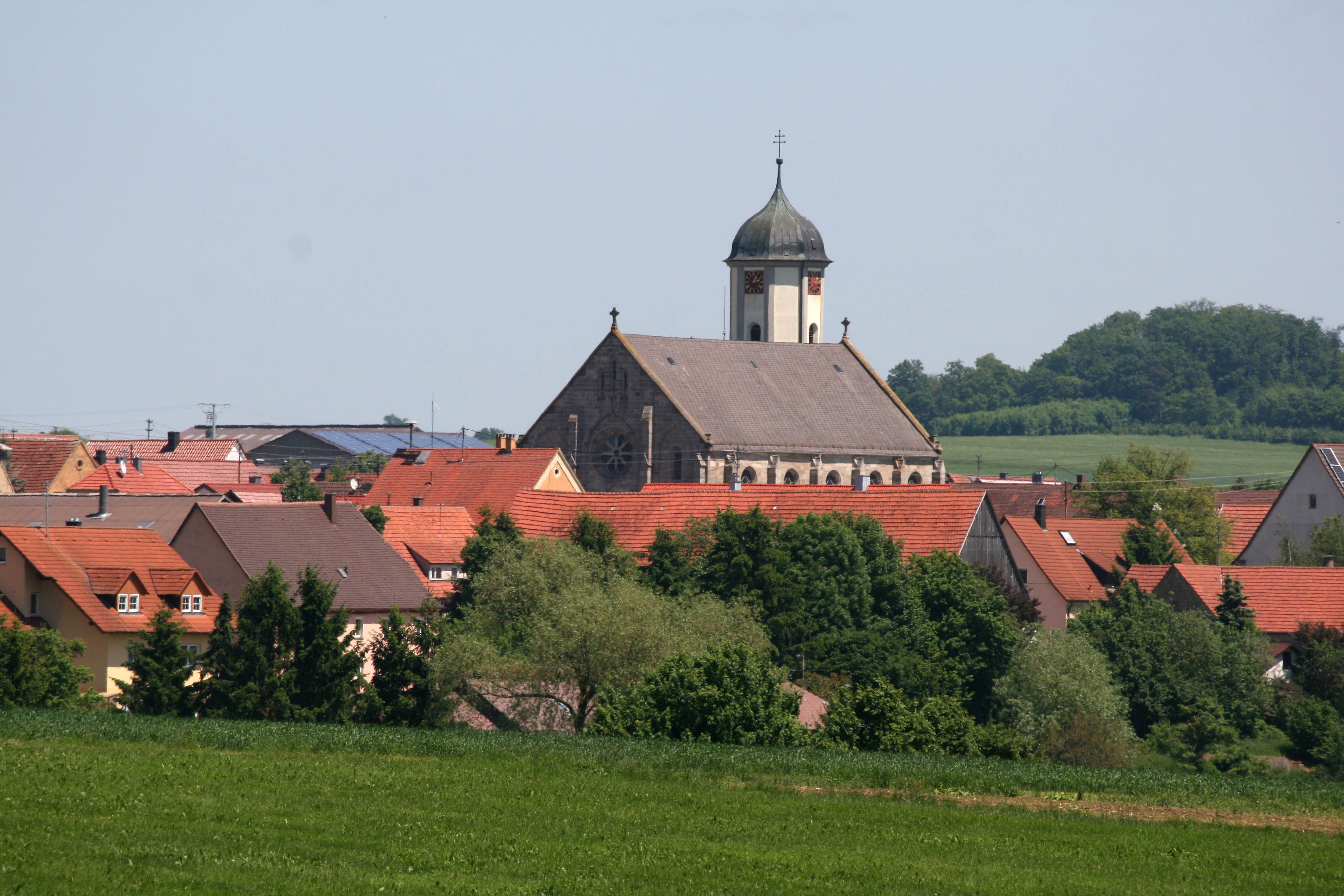 Pfahlheim mit Kirche St. Nikolaus von Südwesten gesehen.